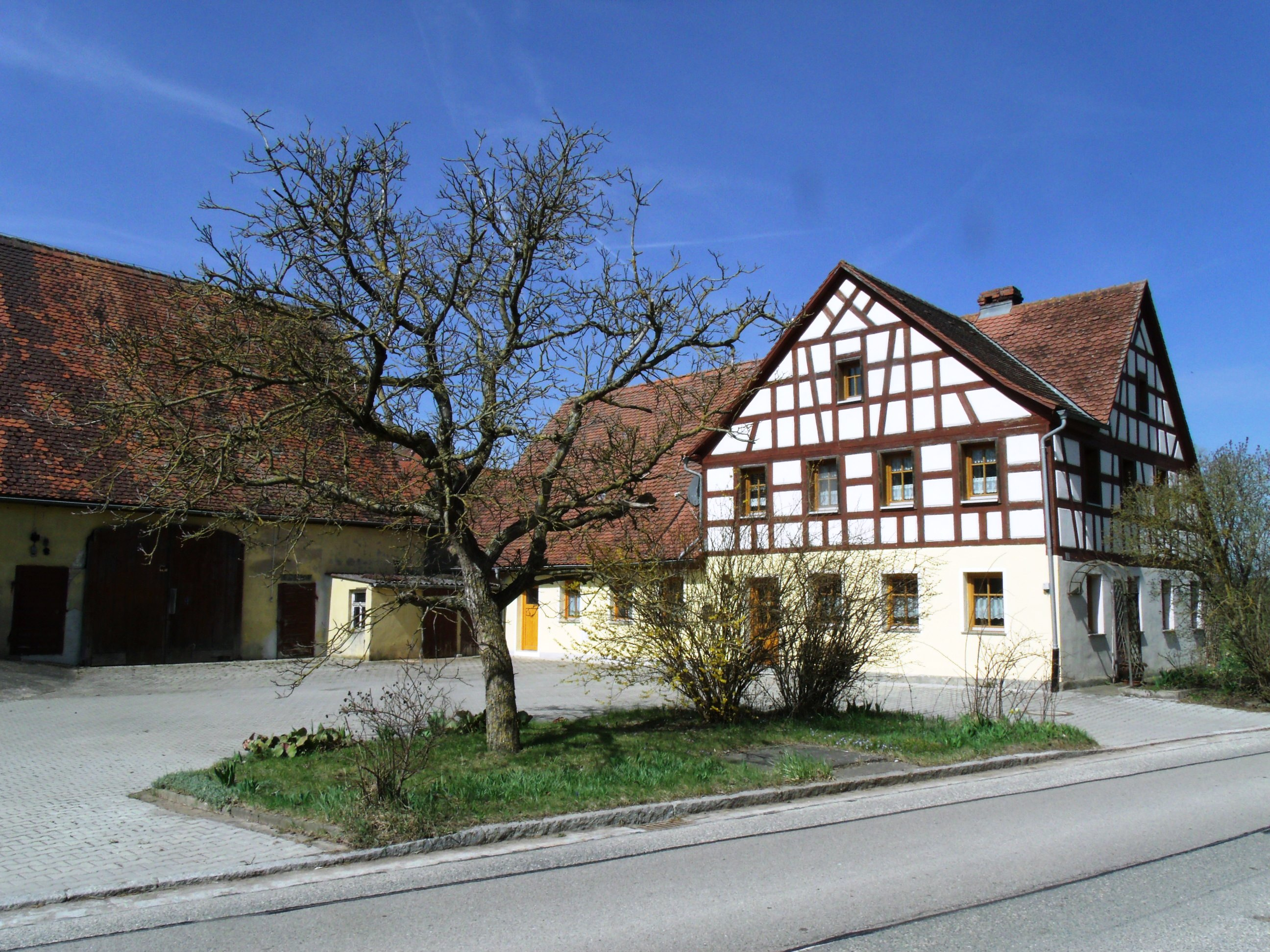 Erlbach, Ortsteil von Leutershausen im Landkreis Ansbach